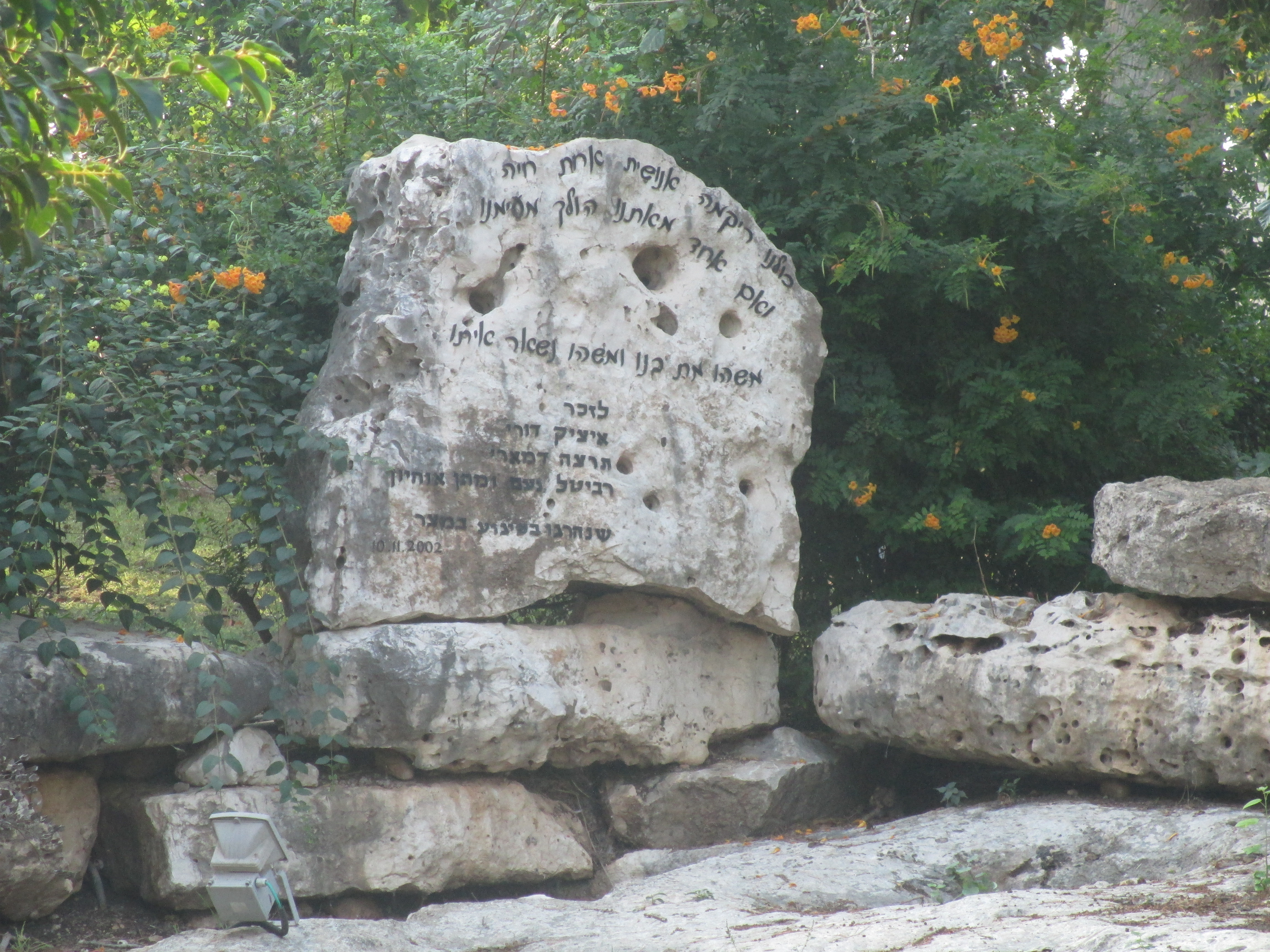 אנדרטה בקיבוץ מצר לנרצחים בפיגוע ב-2002